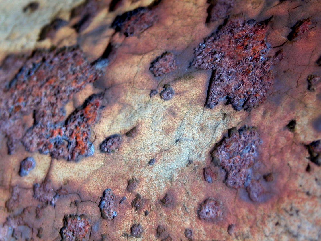 Rust flake